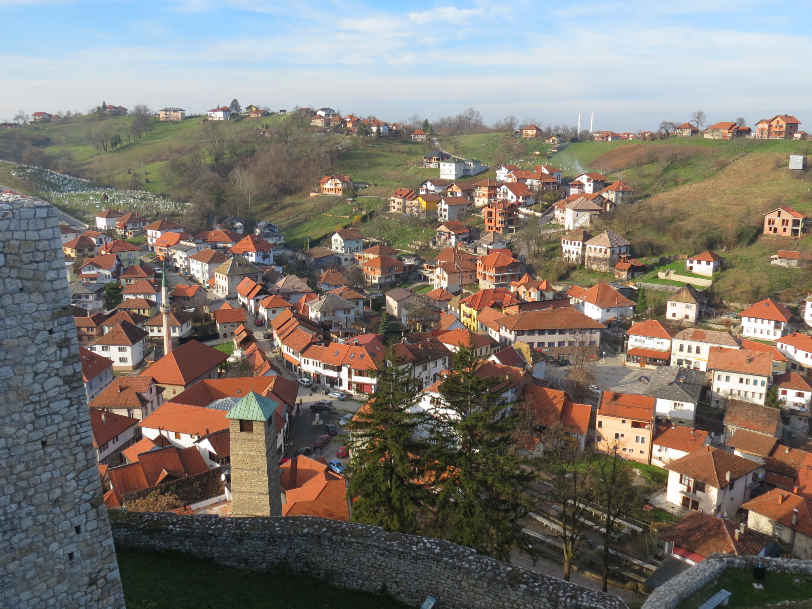 Tešanj - Vue depuis le Château